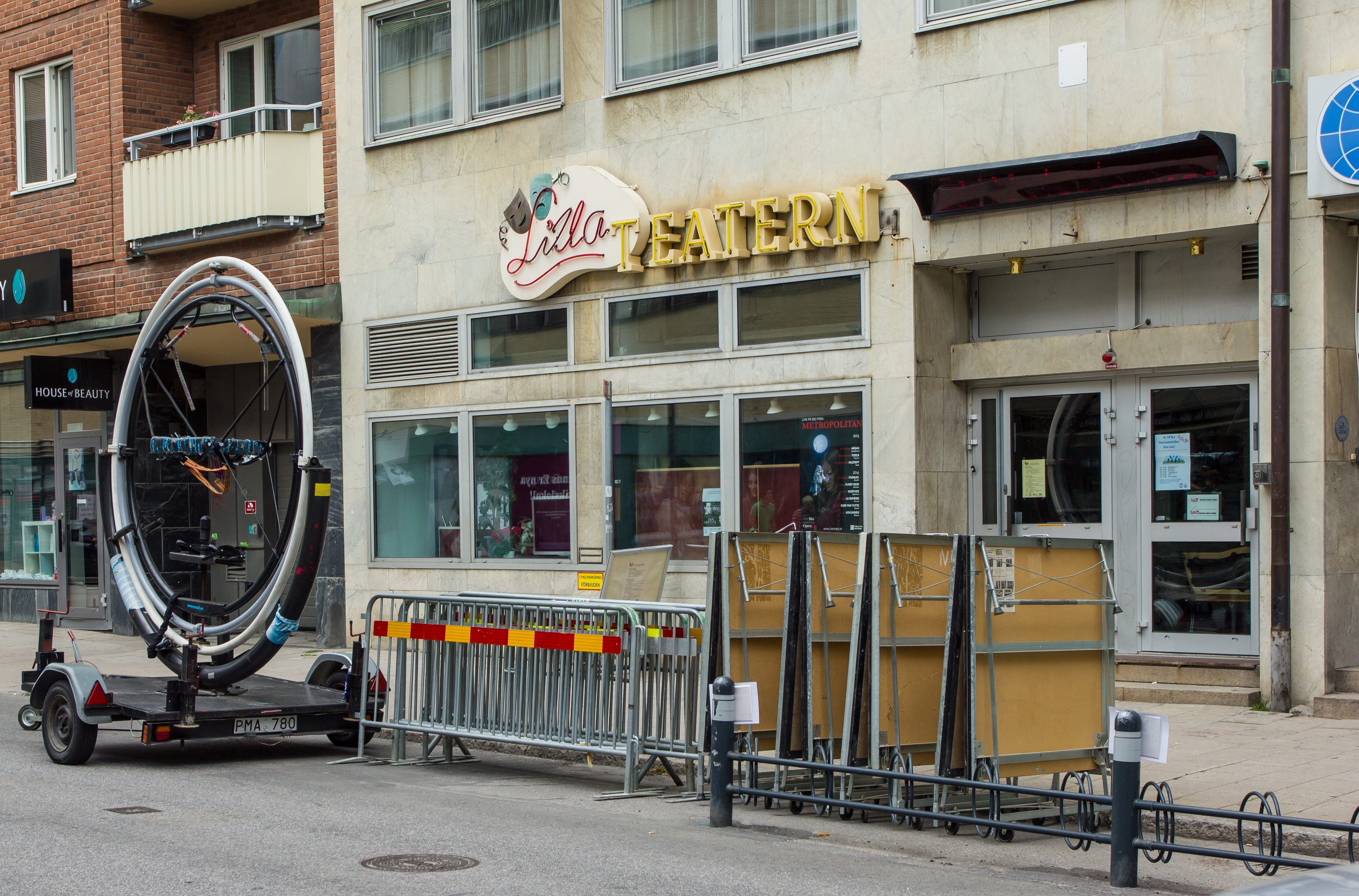 Lilla Teatern, Norrköping, Sverige